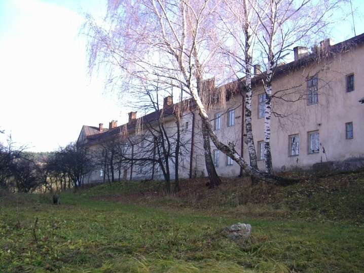 Головний корпус Словітського монастрия